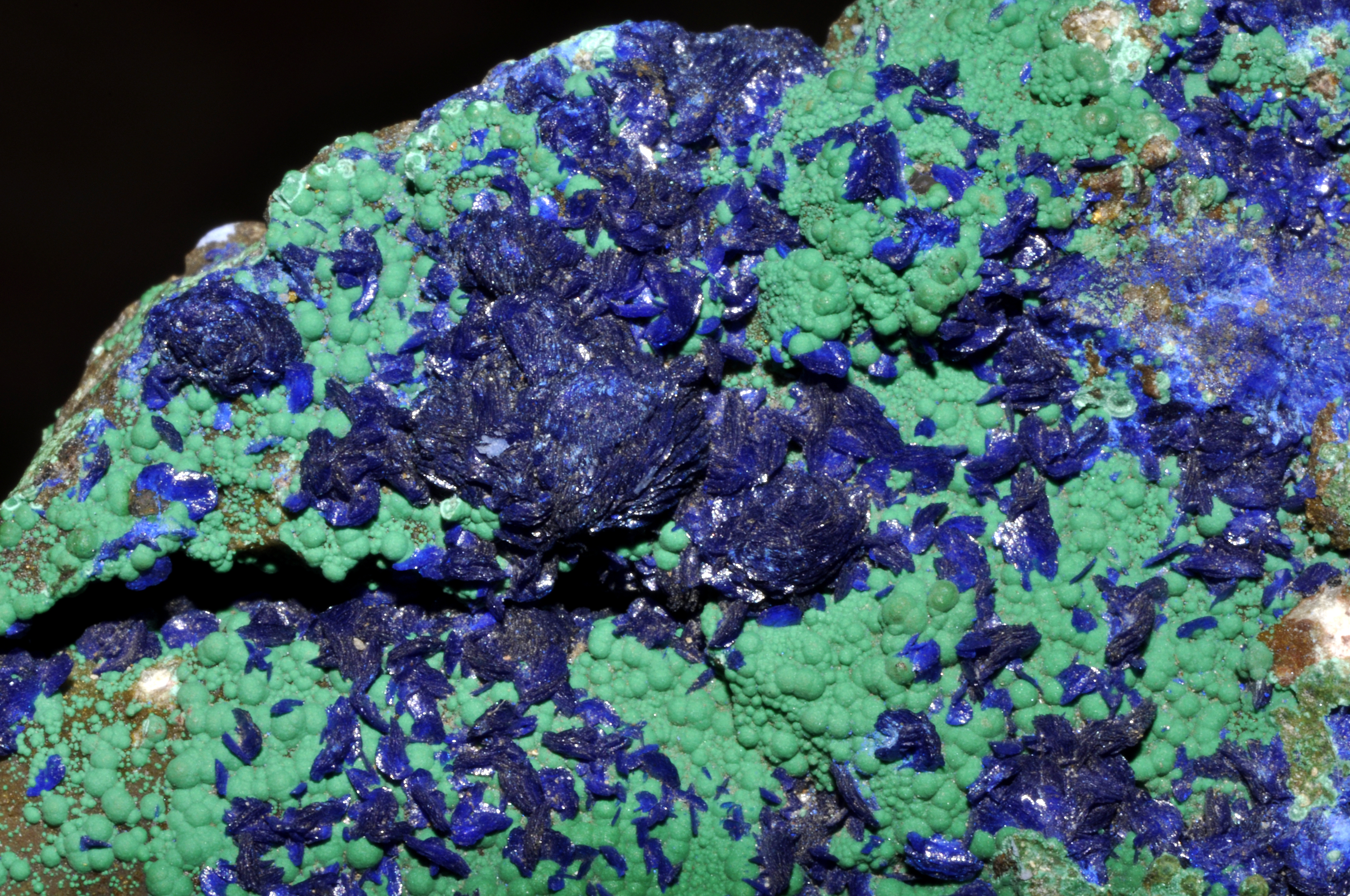 Cristaux d' Azurite sur nodules de Malachite